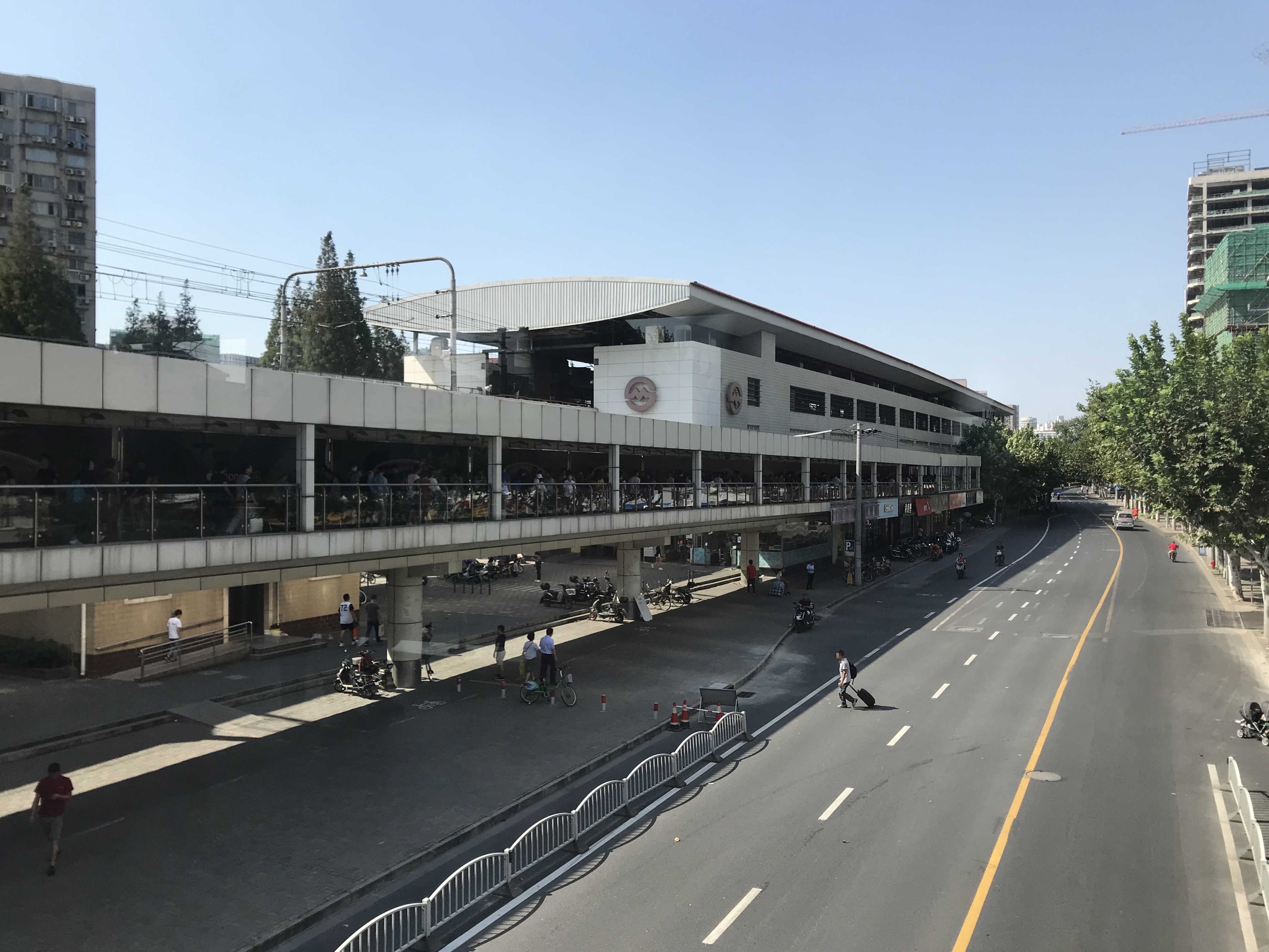 虹橋路駅(上海地下鉄3・4号線)の駅舎と凱旋路